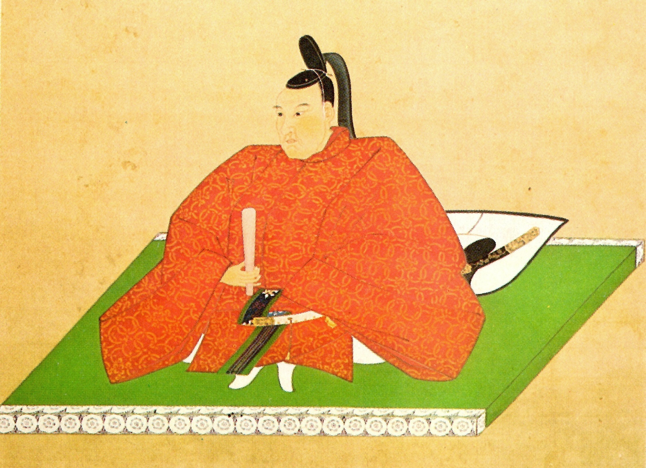 松浦清(静山)の肖像。